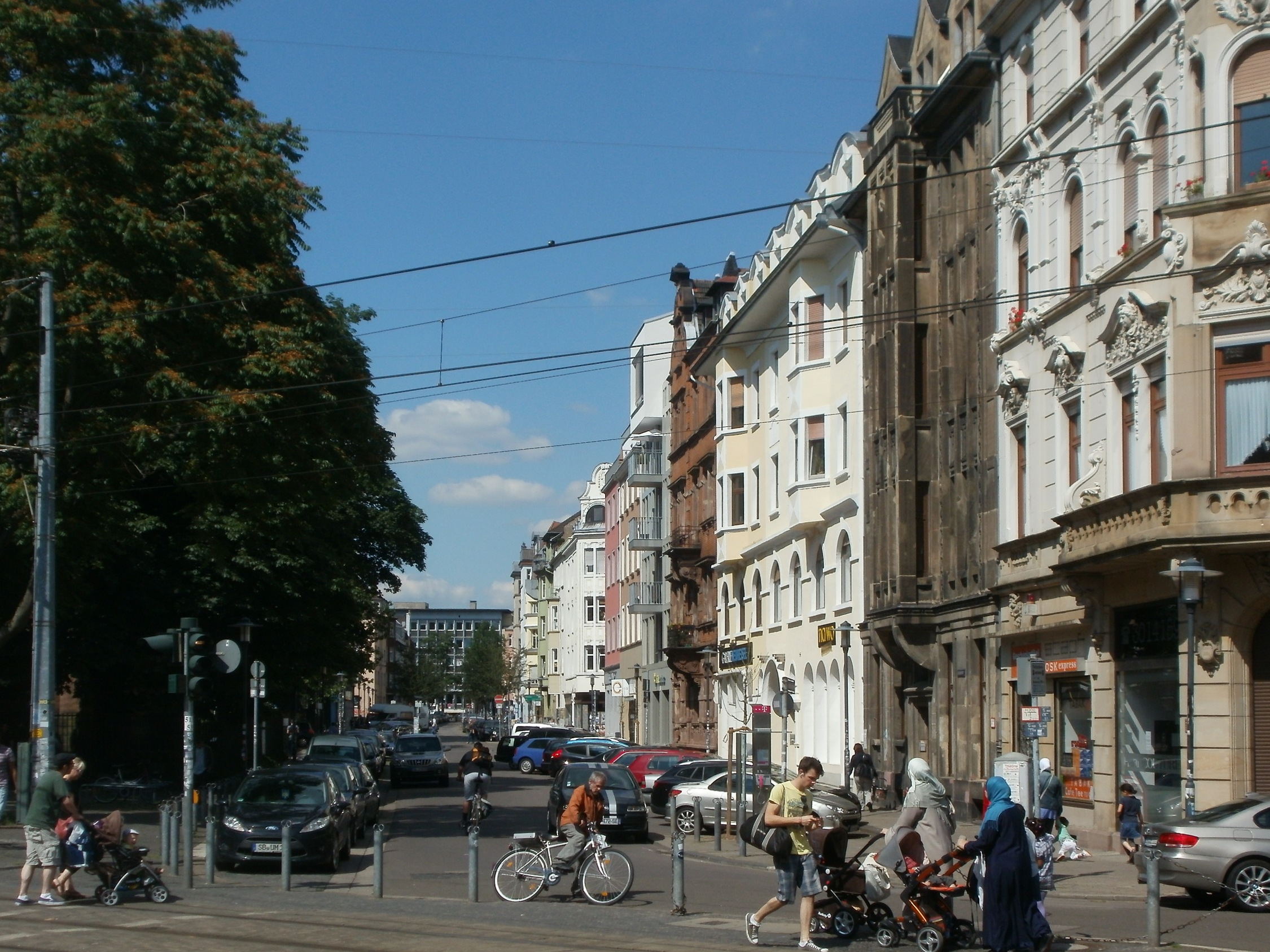 Johannisstraße (Saarbrücken)